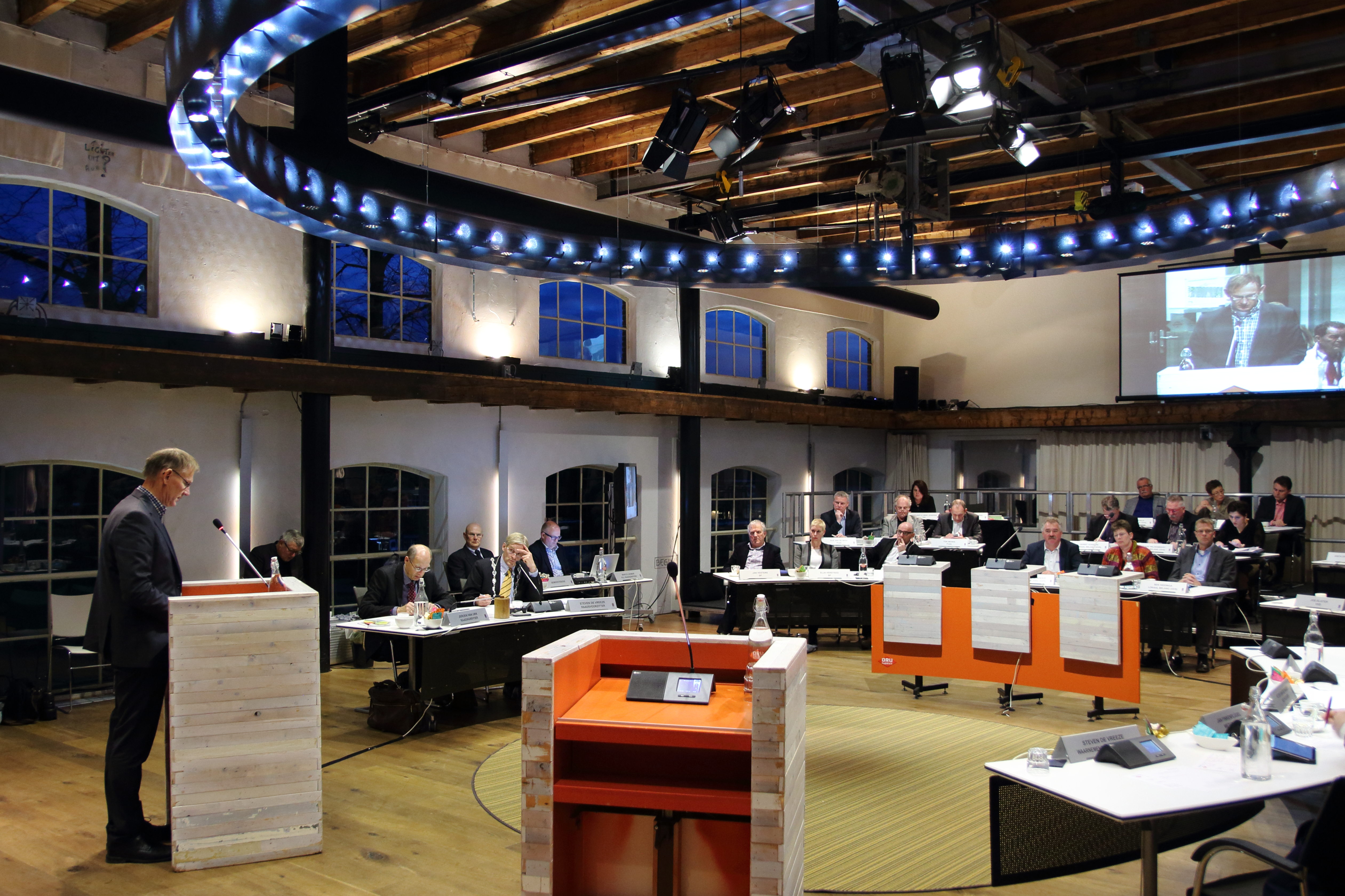 Raadsvergadering in de gemeente Oude IJsselstreek. Eerste zitting met de nieuwe (waarnemende) burgemeester Steven de Vreeze.